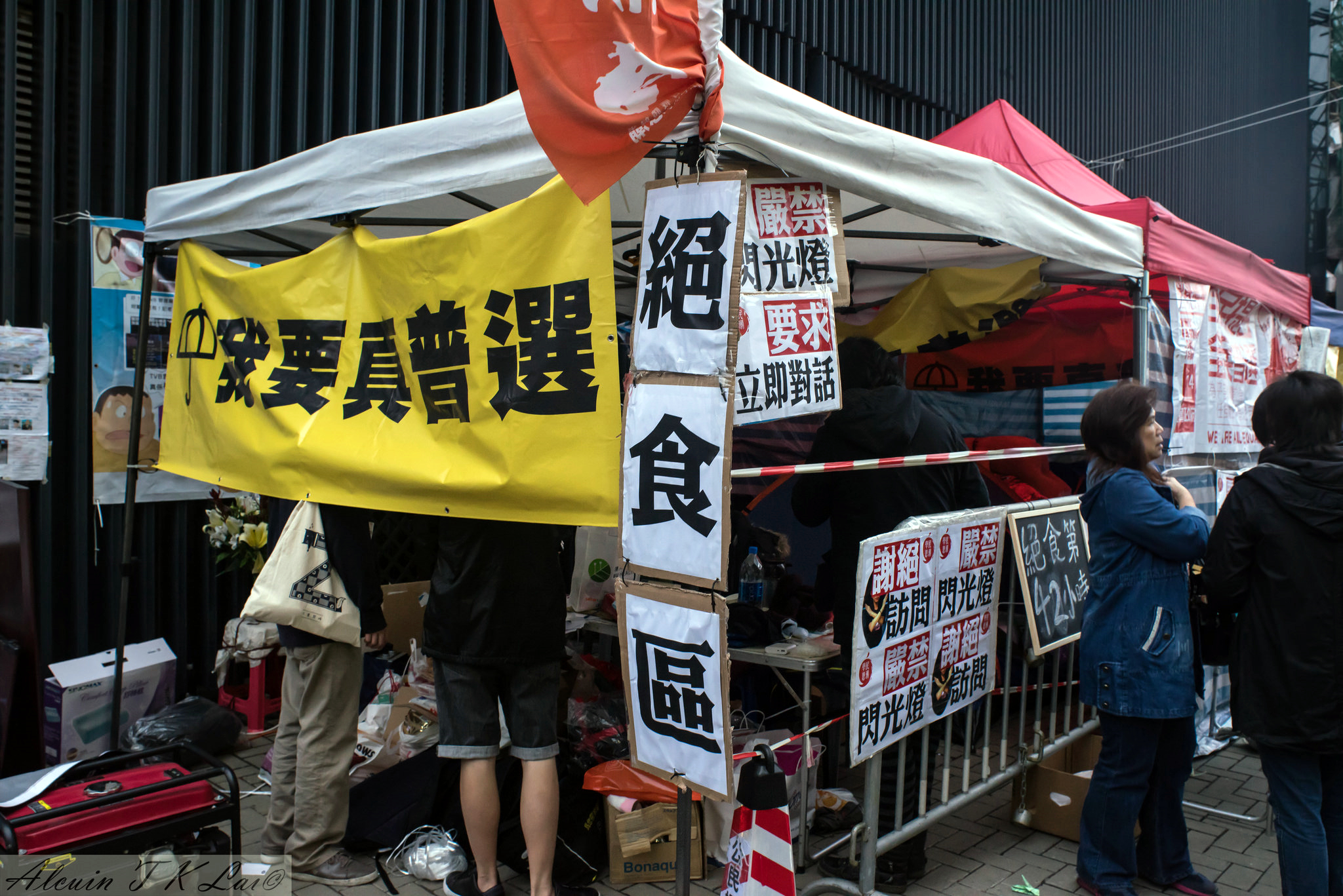 Hunger Strike Zone1 in Admiralty